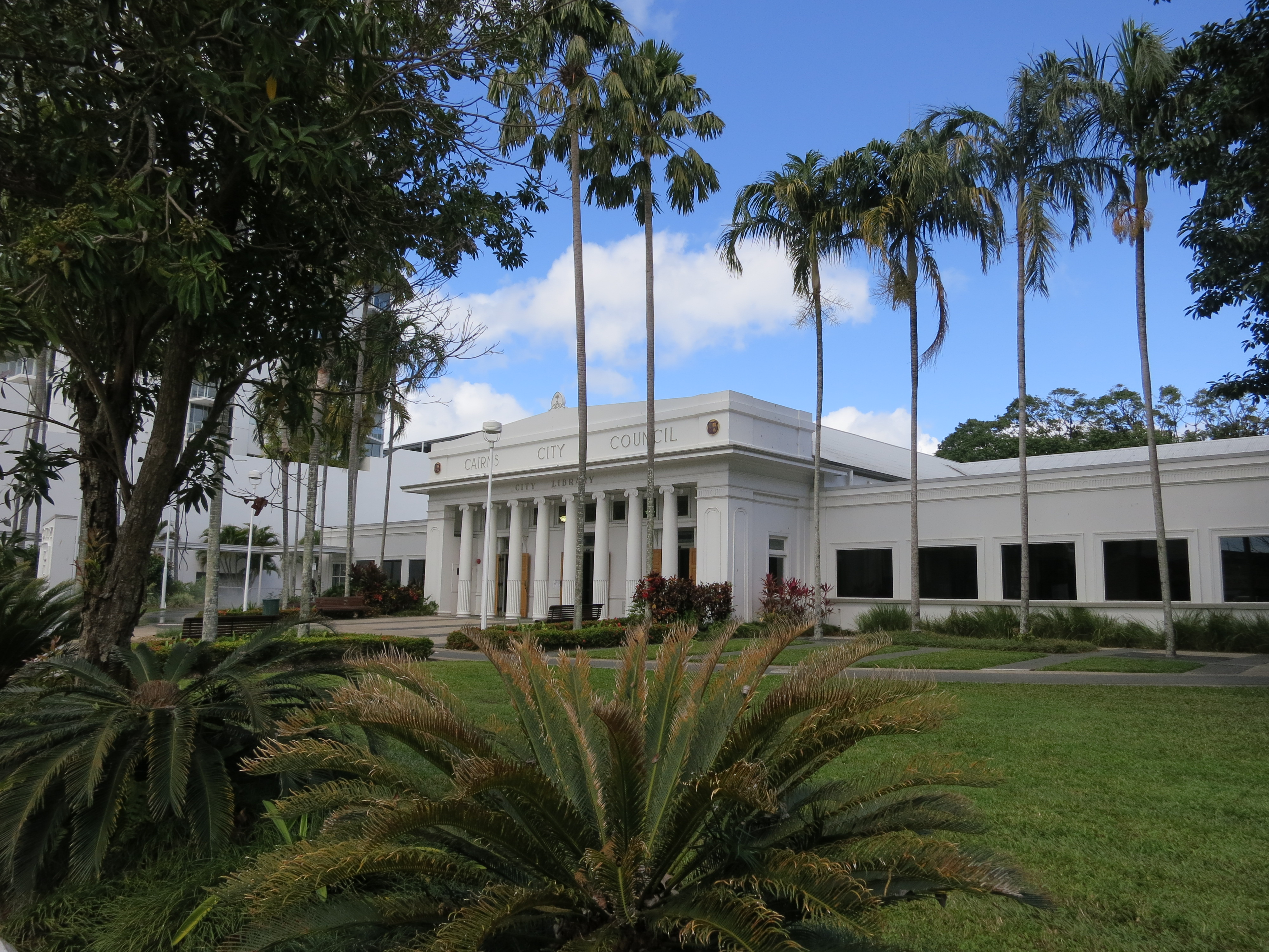 City Library, Cairns, North Queensland, Australia